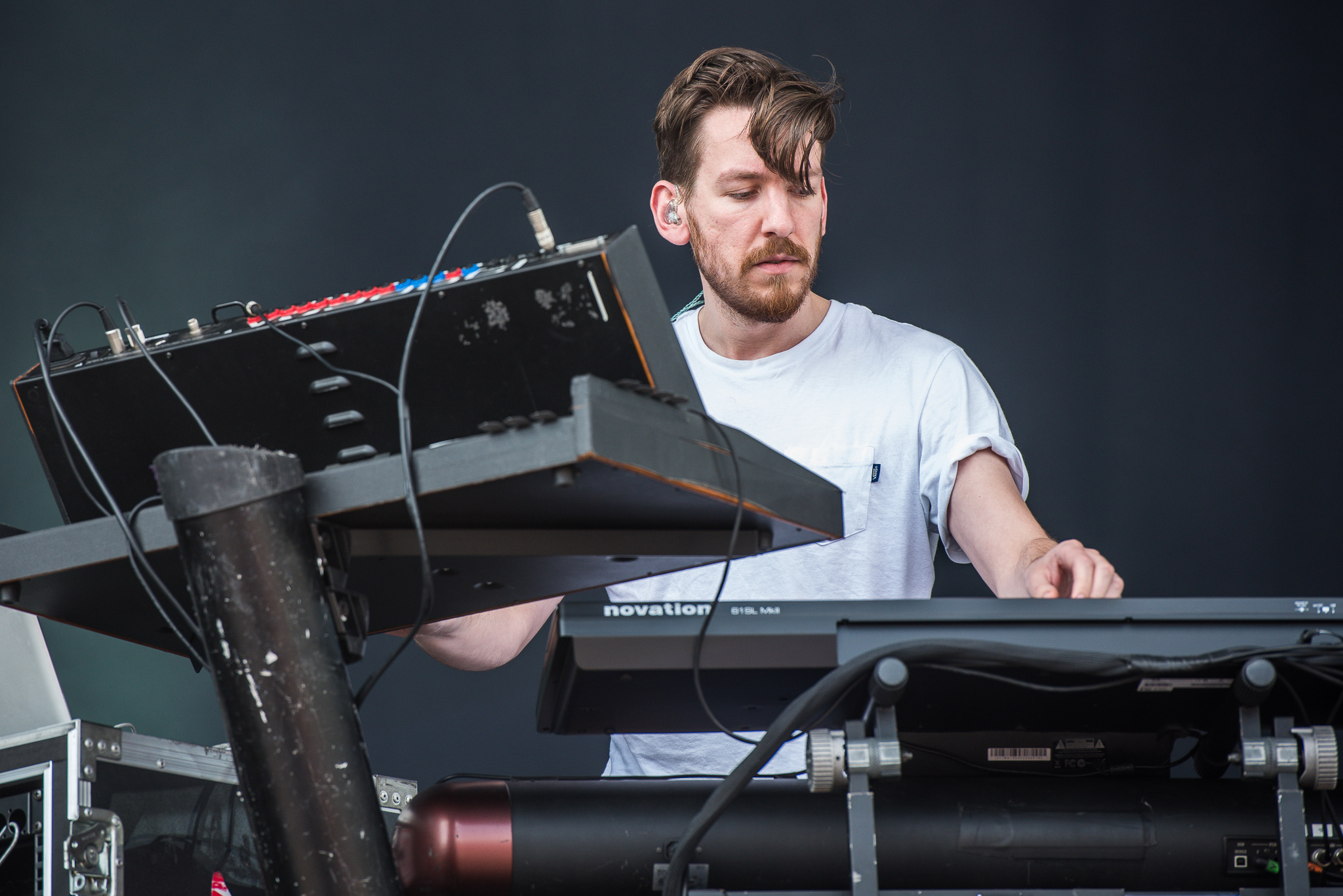 ARGO-Konzerte,Edwin Congreave,Festival,Foals,Konzert,Livekonzert,Livemusik,Musik,RiP,Rock im Park 2016,Seat Zeppelin Stage